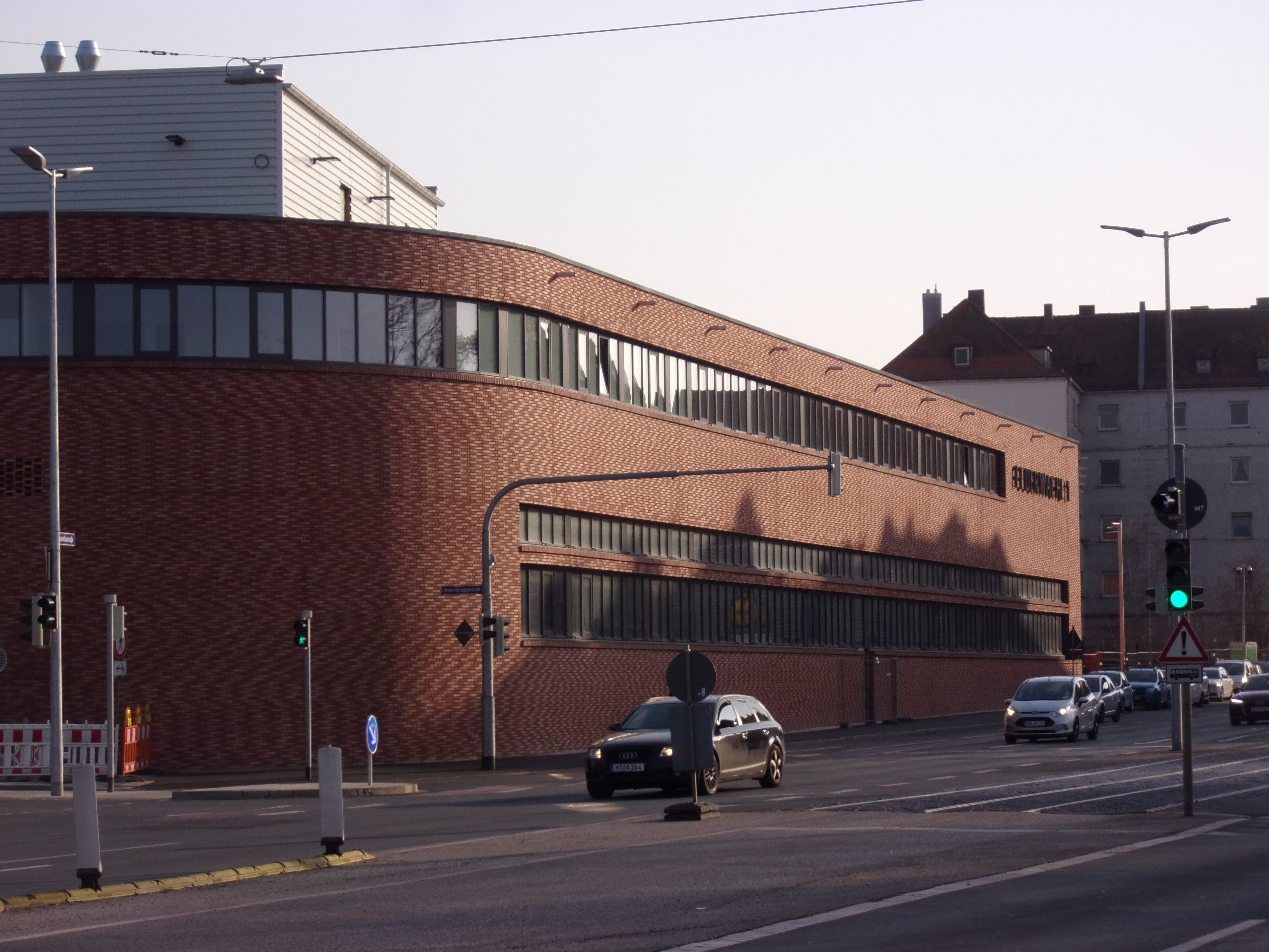 Neubau der Feuerwache 1 in Nürnberg, Ansicht von der Maximilianstraße vor der Inbetriebnahme